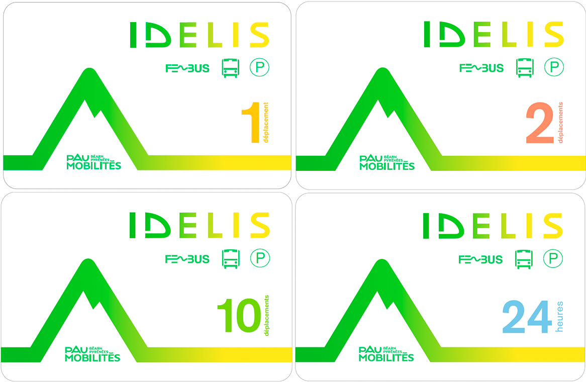 Tickets du réseau de bus Idelis (de Pau) en 2020